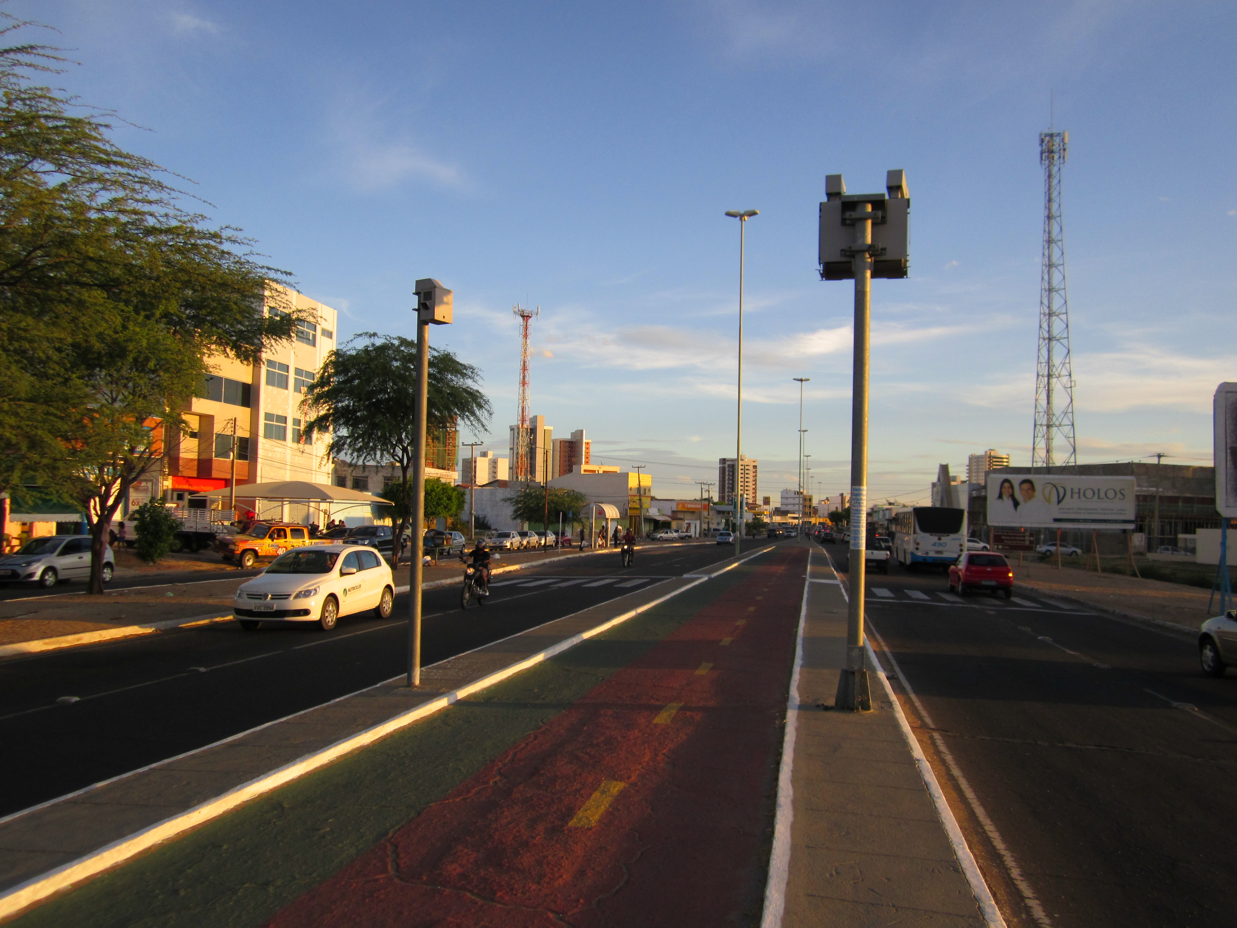 Ciclovia da Avenida Monsenhor Ângelo Sampaio - Petrolina, Pernambuco, Brasil